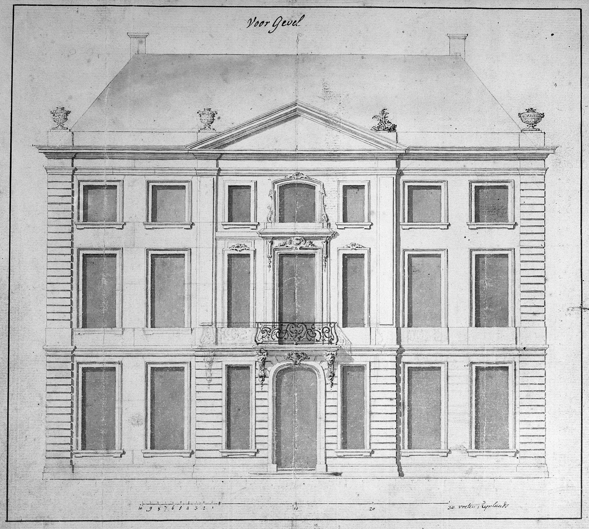 Uitgevoerd ontwerp van het huis voor Anthony Patras (1718-1764) aan het Lange Voorhout in Den Haag.